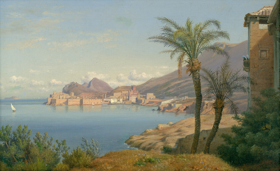 Ansicht von Ragusa (Dubrovnik) mit historischem Hafen und der Altstadt. Öl auf Leinwand. 30x48 cm. Unten links signiert "Louis Gurlitt".